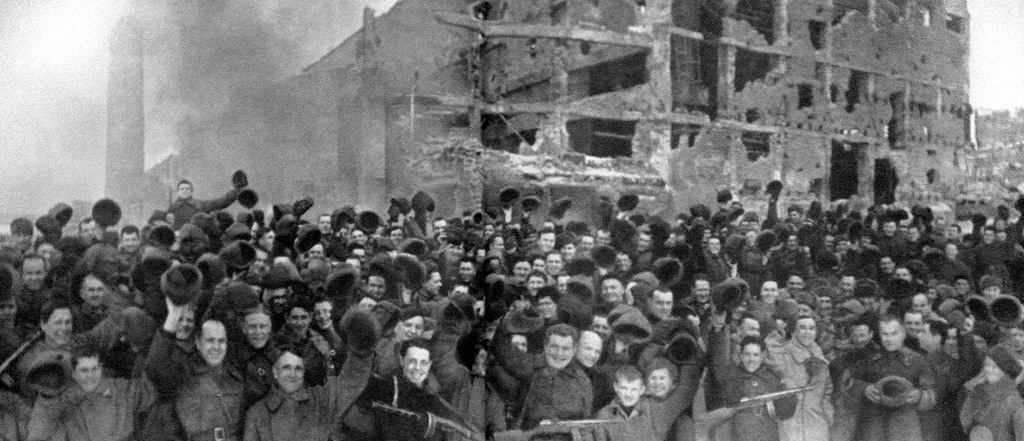 Бойцы 95-й стрелковой дивизии (62-я армия) после освобождения завода «Баррикады». Февраль 1943 г